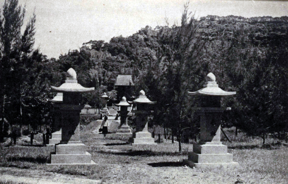 中文（台灣）: 新高社位於台中州新高郡集集街的集集公園